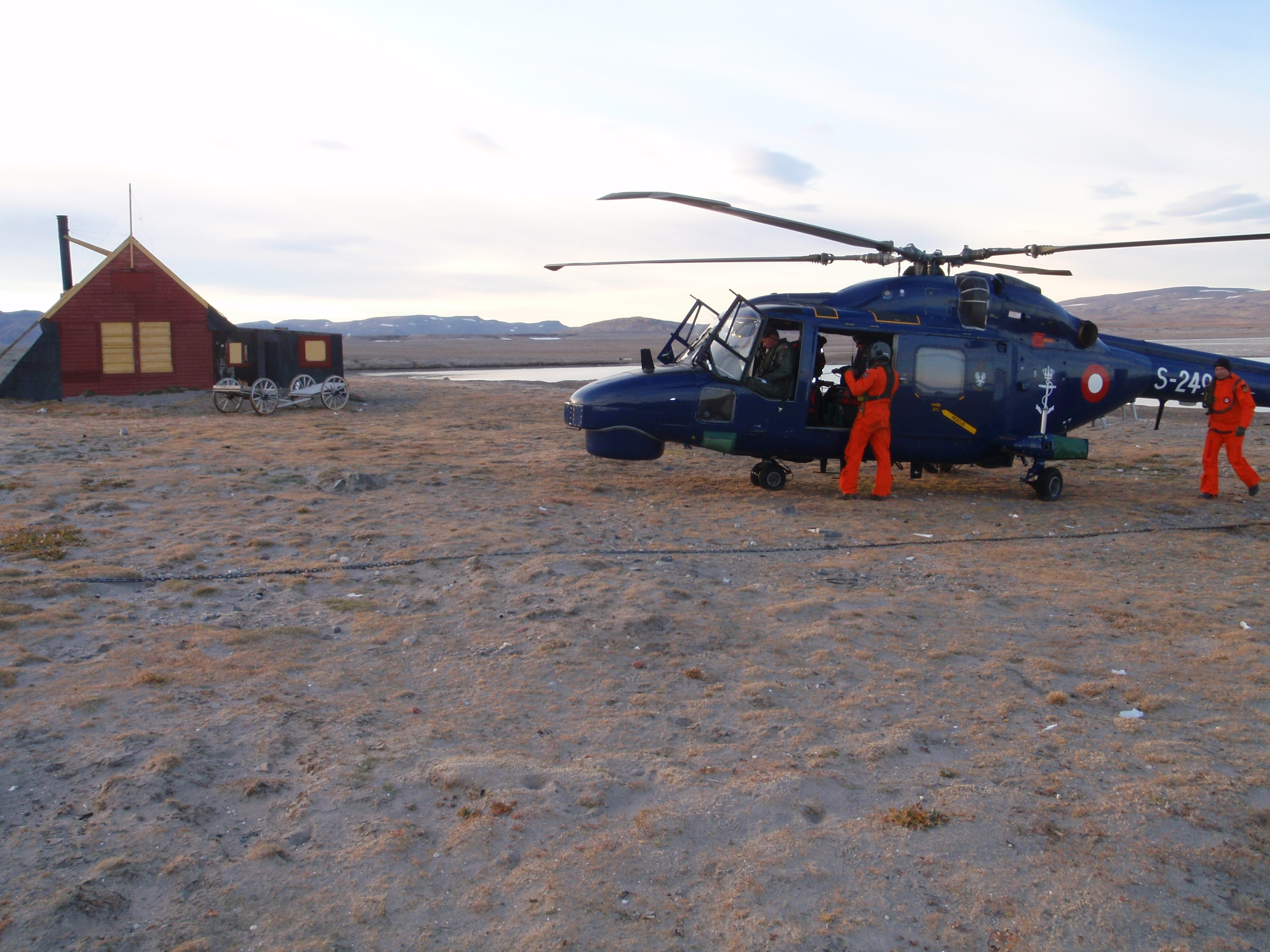 Slædehytte der benyttes af Sirius patruljen om vinteren. Her under opfyldning af depoter med helikopter.